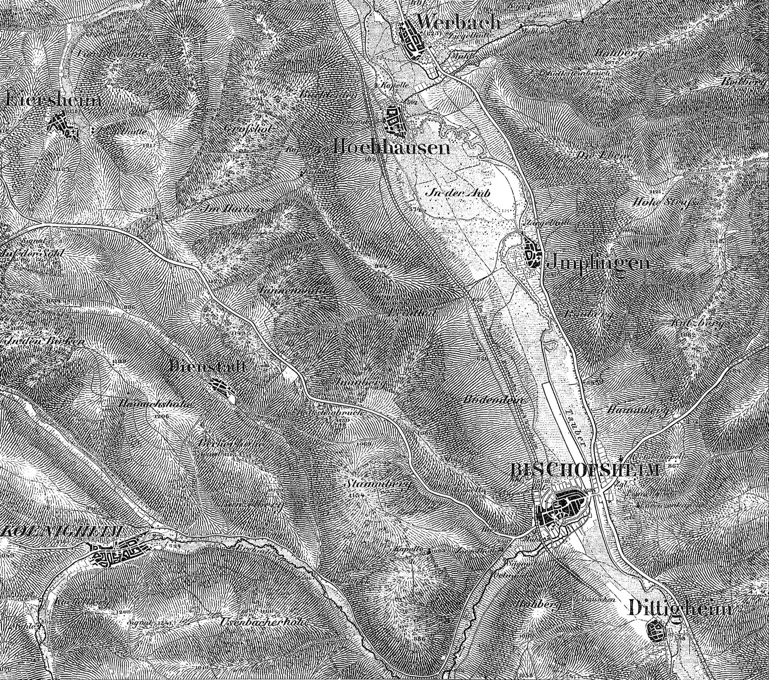 Plan des Gefechtsfeldes von Bischofsheim und Werbach